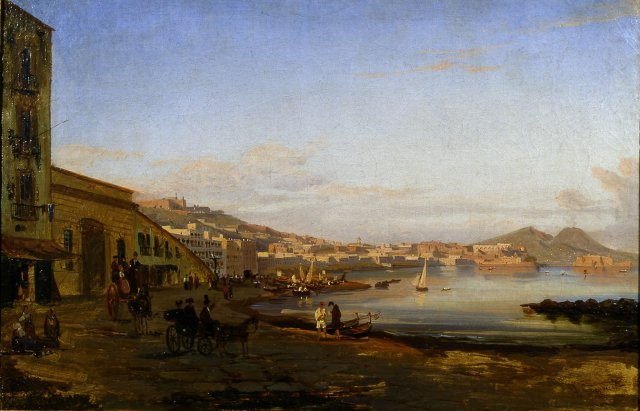 in realtà si tratta della marina di Mergellina.